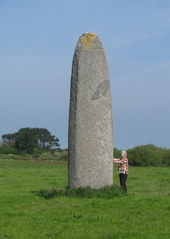 Kerhouezel bei Porspoder (Finistere)